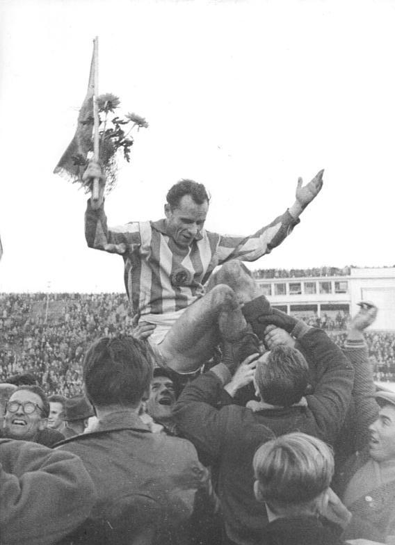 Zentralbild-Schaar Wen-Noa 29.11.1959 Neuer deutscher Fußballmeister: SC Wismut - Durch ihren 2:0-Erfolg über Lok Leipzig am 29.11.1959 im Leipziger Zentralstadion konnte der SC Wismut Karl-Marx-Stadt sich den Titel eines deutschen Fußballmeisters wieder zurücksichern. UBz. Begeisterte Wismut-Anhänger tragen hier Siegfried Wolf nach dem siegbedeutendem Spiel auf den Schultern vom Platz.